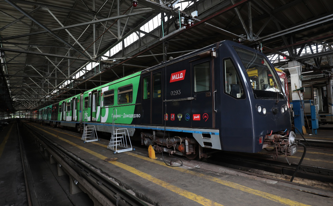 Поезд в депо